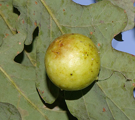 Makroaufnahme eines Gallapfels, selbst fotografiert am 24.09.2006 gemeinfrei